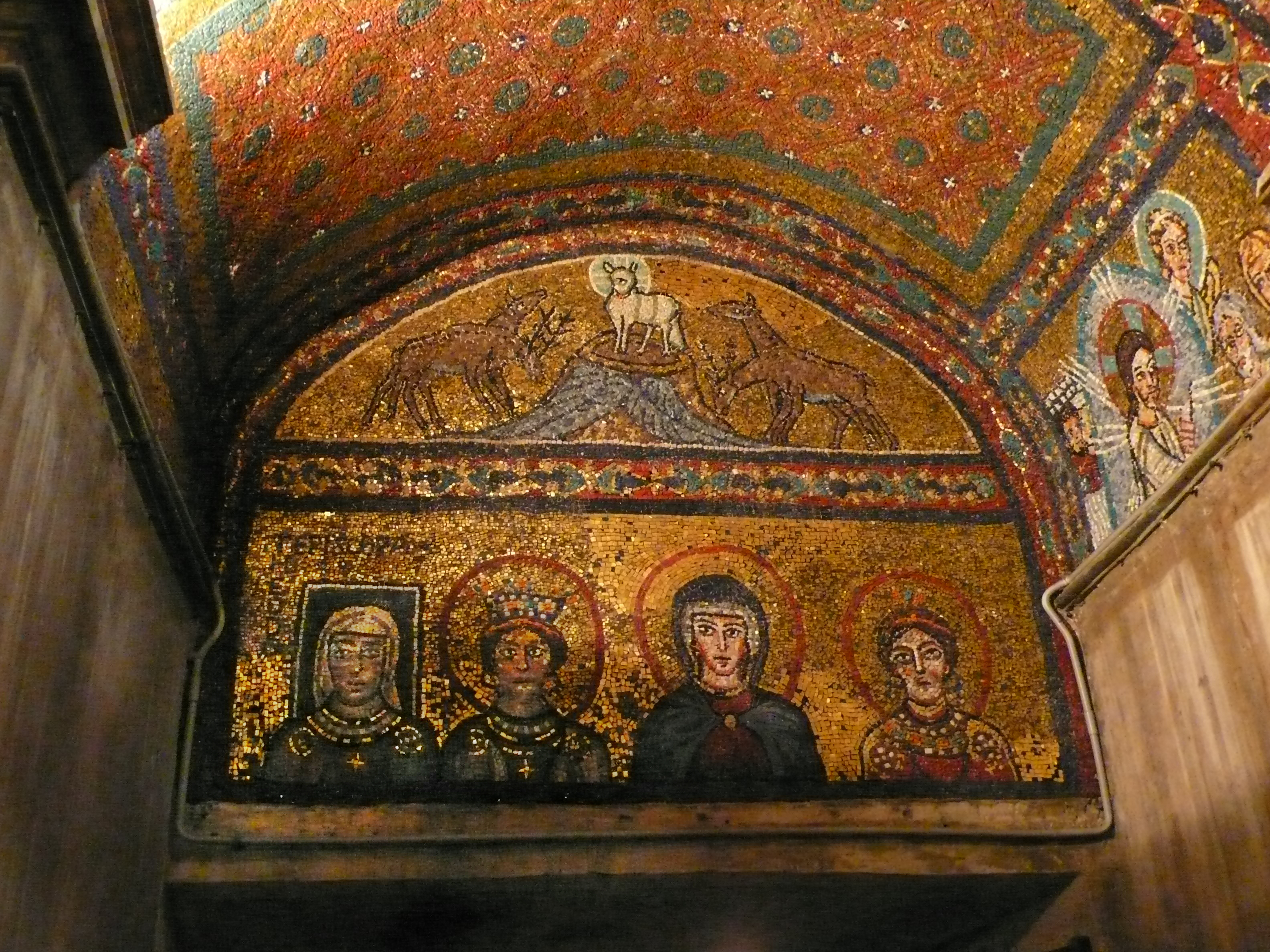 Santa Prassede, Rom; Zeno-Kapelle